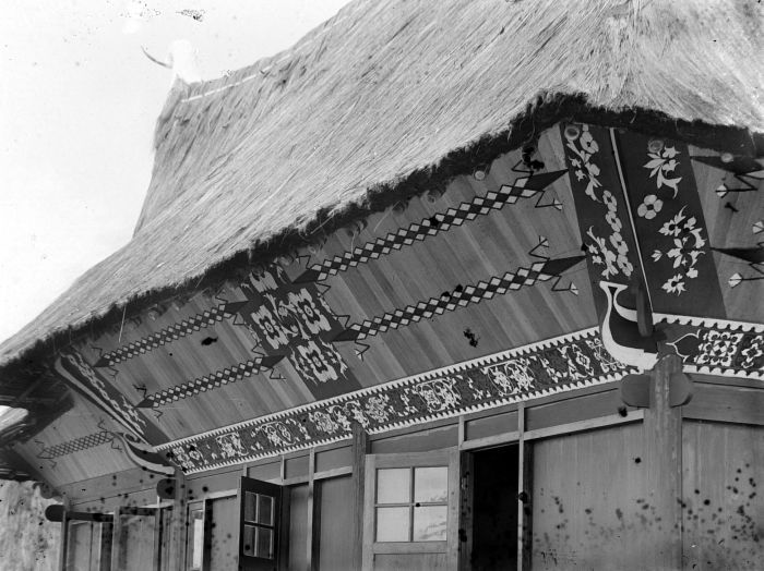 Negatief. De melaatse kolonie, Laoe Si Momo (Bronwater) werd op 25 augustus 1906 op initiatief van assistent-resident Westenberg gesticht. De bedoeling was om de melaatse Batak te isoleren om verdere besmetting te voorkomen. "Getracht zou worden een kolonie te stichten waar alle melaatschen huisvesting en verpleging zouden vinden" (Bodaan n.d. [1921?]:11). De kolonie bevond zich op ongeveer 10 kilometer afstand van Kaban Jahe. Binnen vijf maanden woonden daar 72 leprozen, en in april 1921 was dat aantal gestegen tot 280. De zieken woonden in kleine huisjes.. Beschilderde gevel van de woning van een beheerder van een leprakolonie te Lau Simomo, Sumatra.